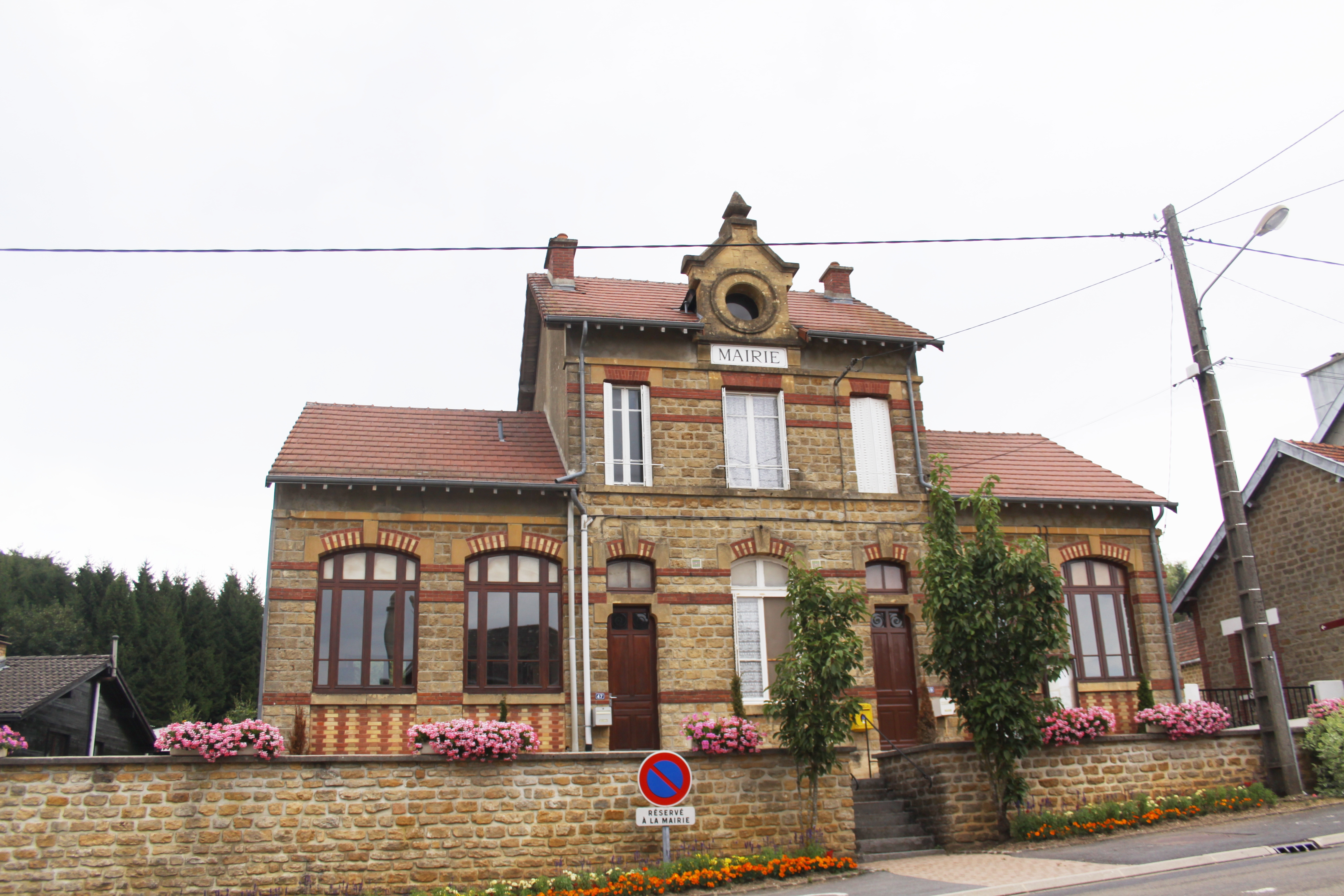 Village Ardennais